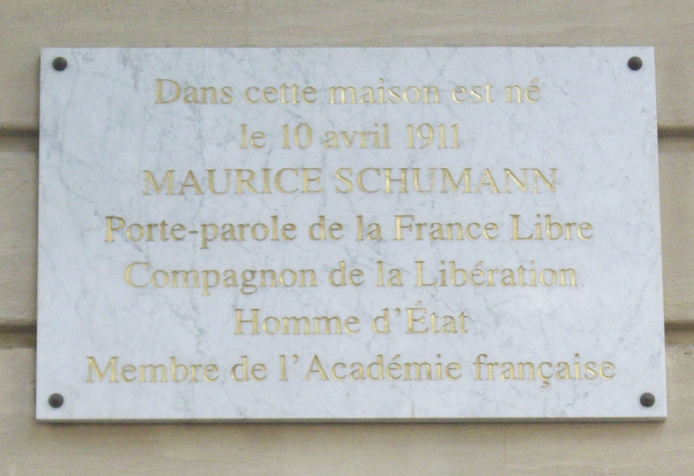 Plaque commémorative, 10 place Victor-Hugo, Paris 16e.« Dans cette maison est né le 10 avril 1911 Maurice Schumann, porte-parole de la France libre, Compagnon de la Libération, homme d'État, membre de l'Académie française. »